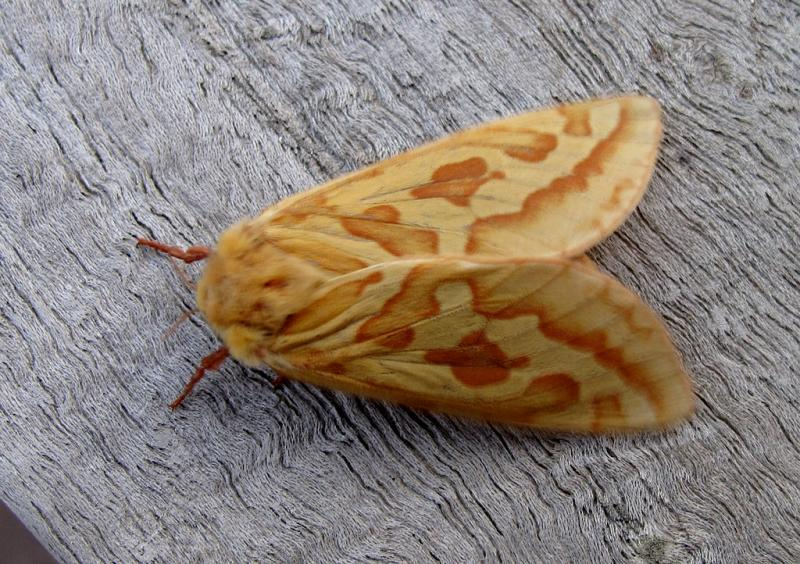 Vrouwtje hopwortelboorder (Hepialus humuli)